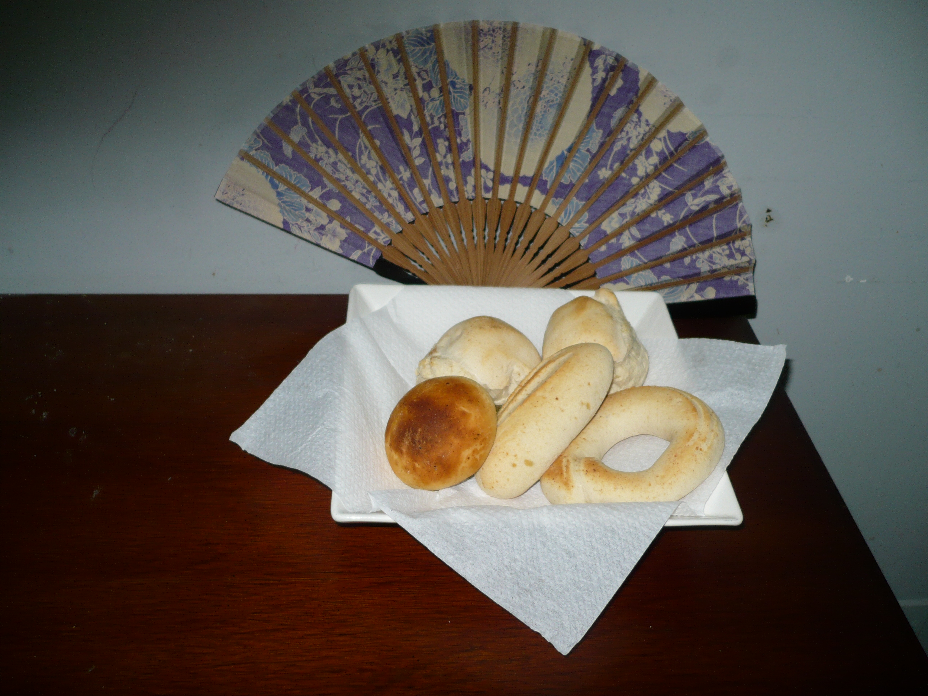 Imagen que contiene: atrás dos Pandeyucas, adelante a la derecha dos Pandebonos y adelante a la izquierda una Almojábana. Gastronomía de Colombia.